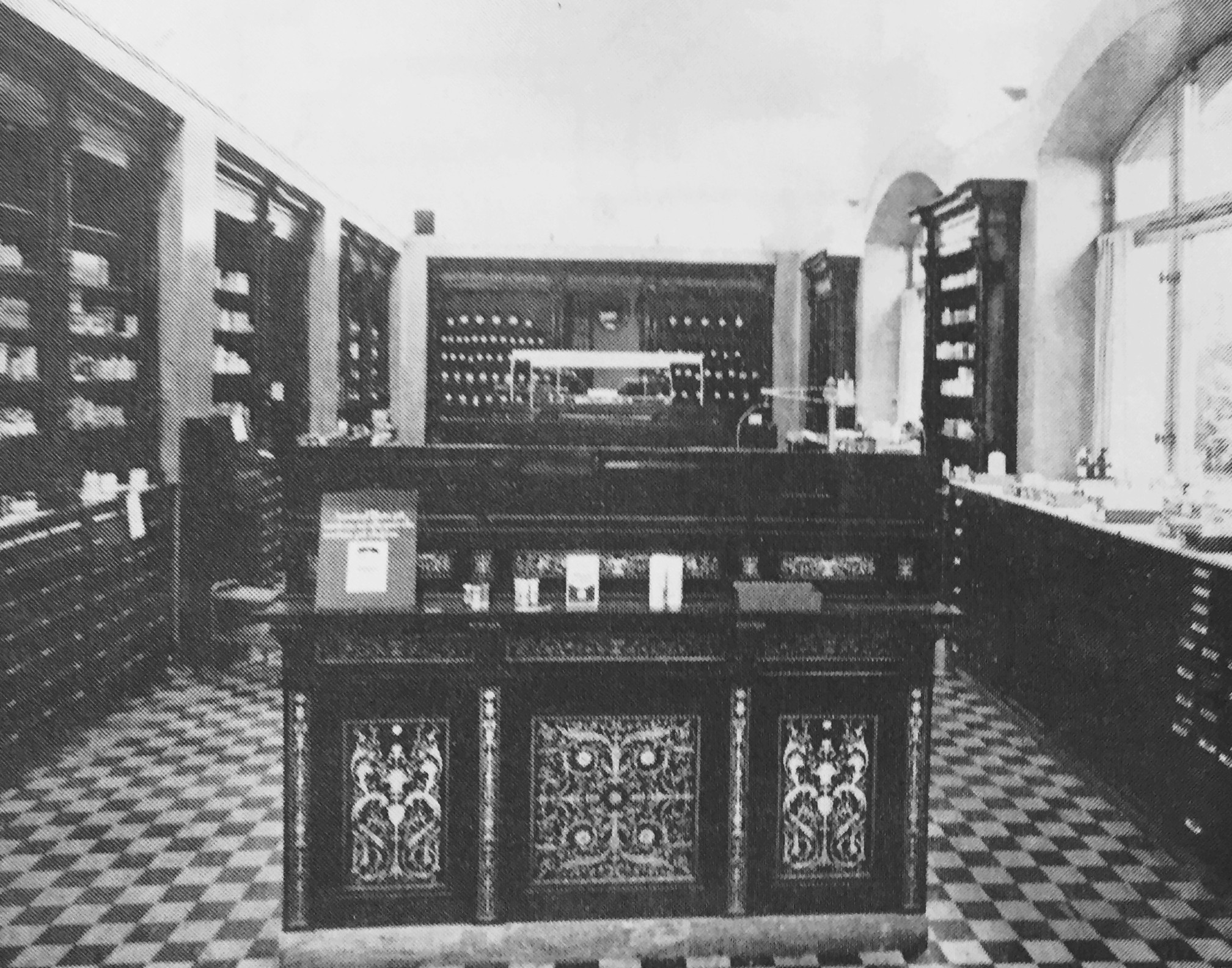 Apoteket Nordstjernan, officin